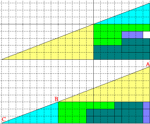 失踪的正方形，8乘以21版本 角ABC約等於179.5185度，近乎平角而不是平角